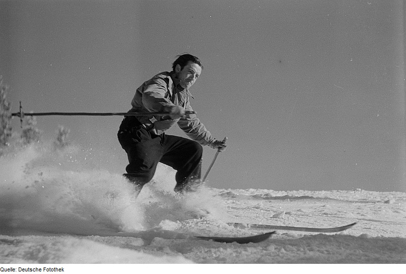 Original image description from the Deutsche Fotothek Skifahrer